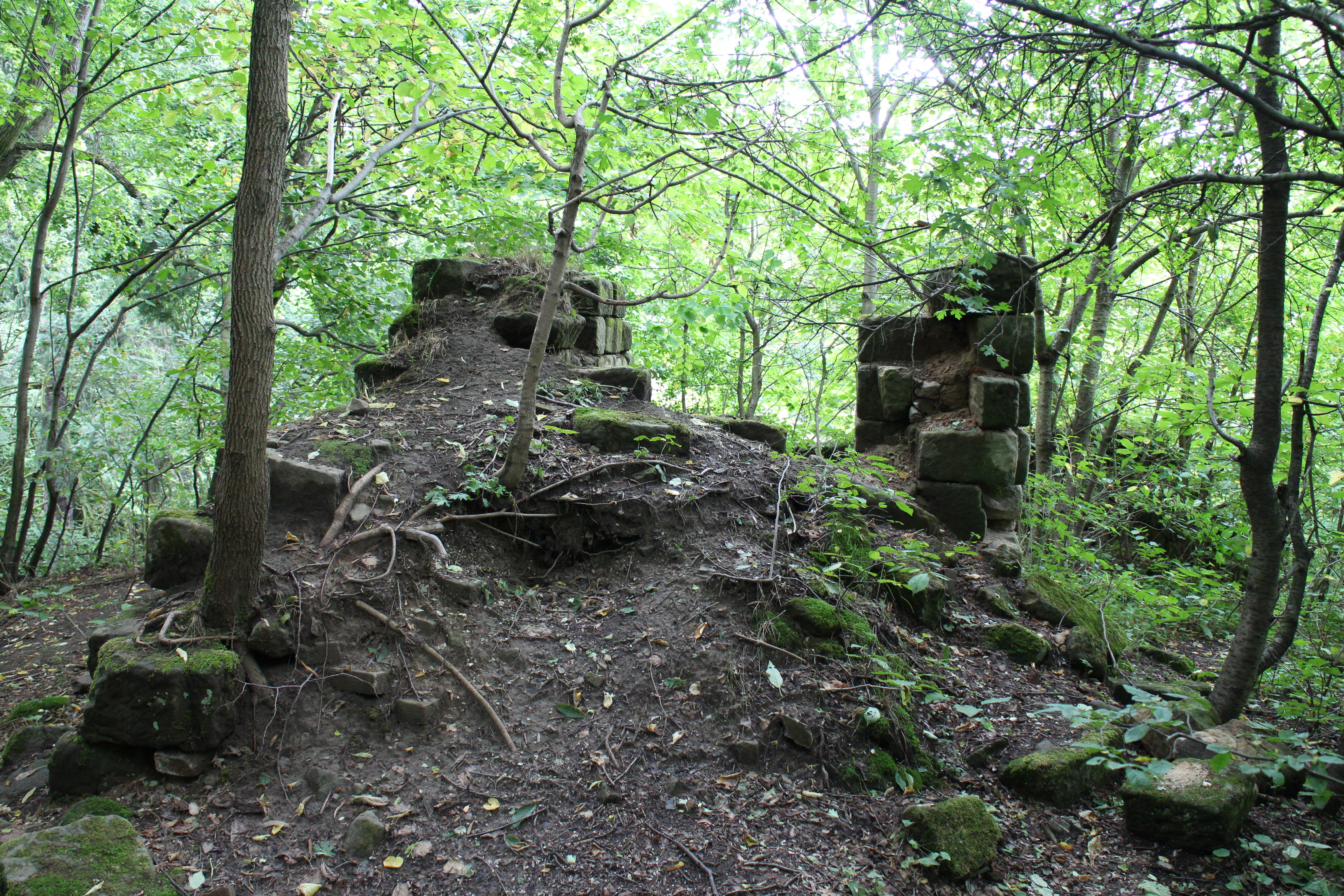 Hrada, Klamorna a Drábské světničky, severovýchodně od vsi, Dneboh.